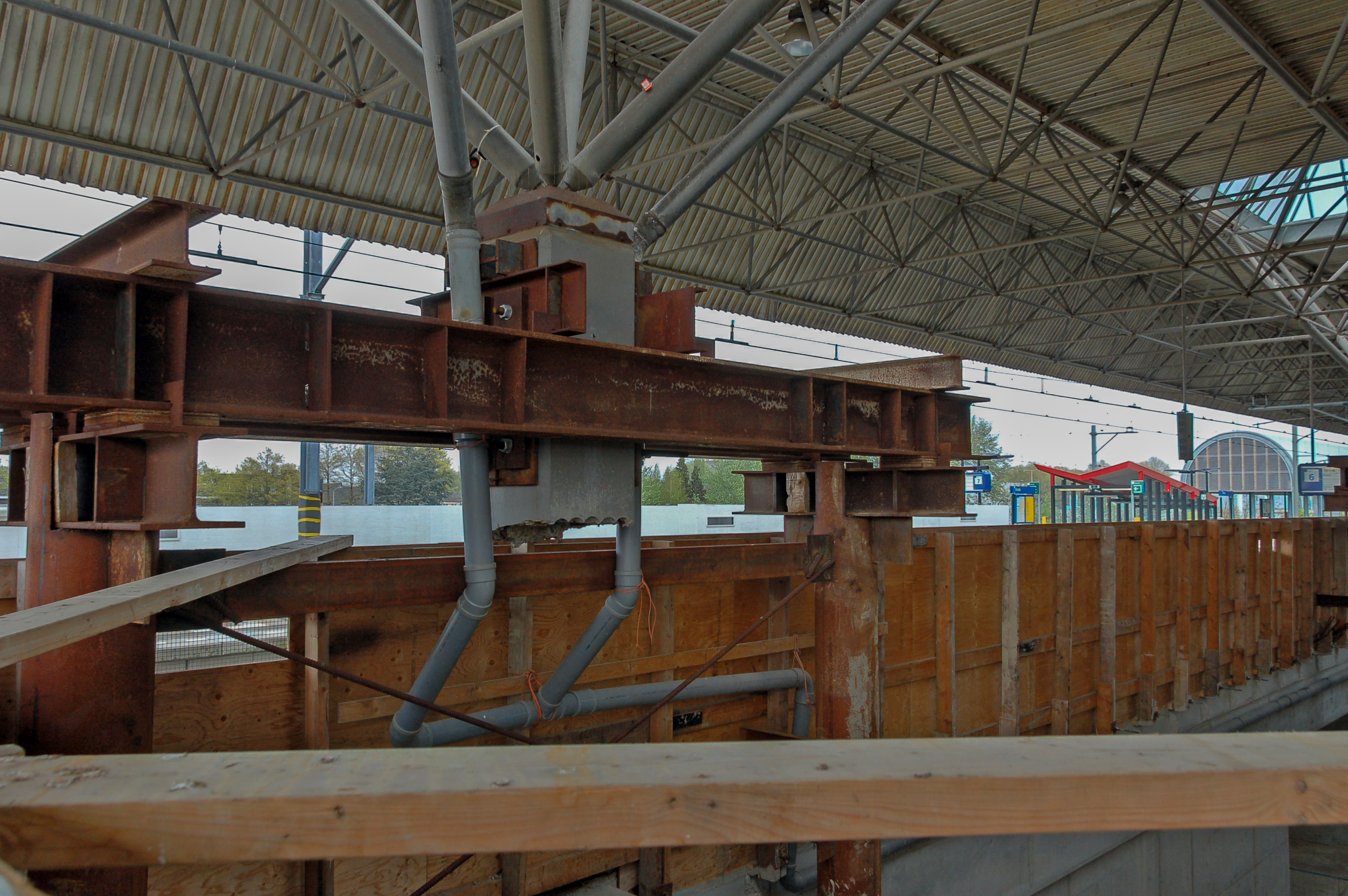 Breda, Niederlande, Hilfsträger als Unterfangung am Bahnhof